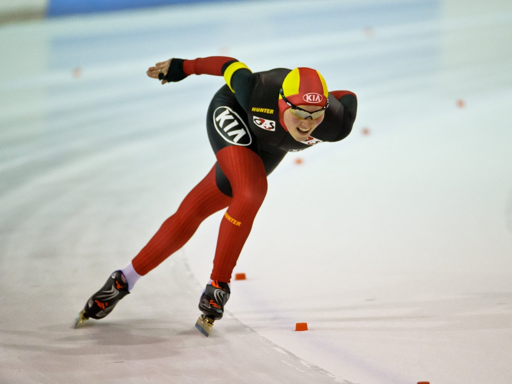 Belgisch kampioenschap hardrijden 2013